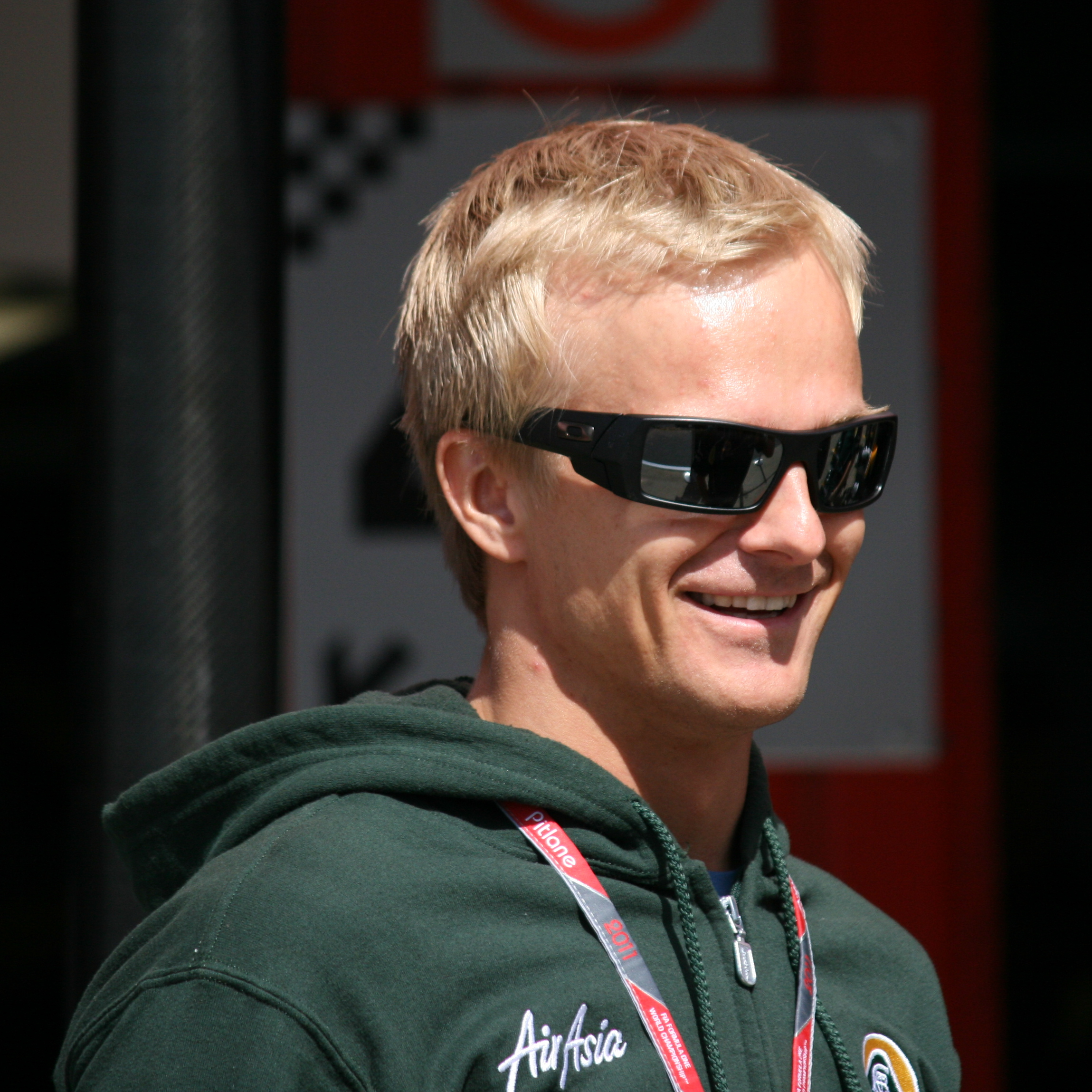 Heikki Kovalainen